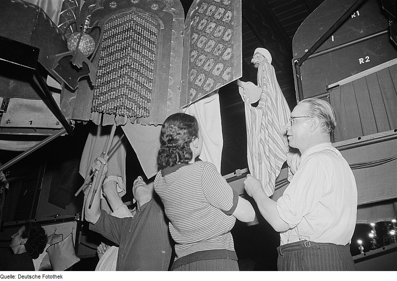 Original image description from the Deutsche Fotothek Puppenspieler Paul Hölzig mit Kollegen bei einer Aufführung einer Hodsha Nasreddin-Geschichte